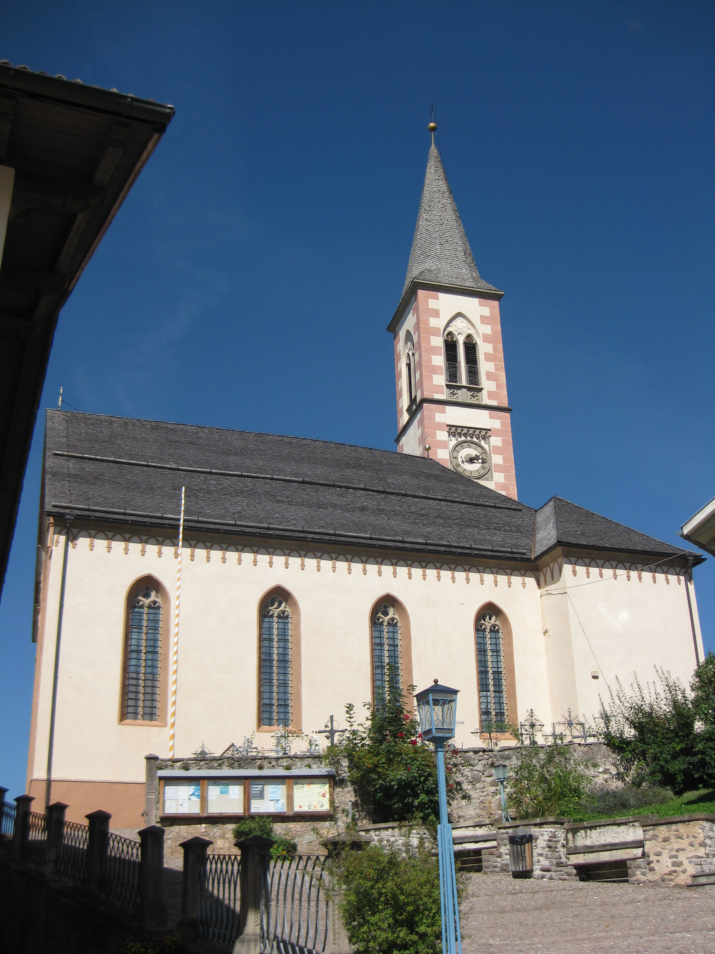 Pfarrkirche zum Heiligen Kreuz und St. Jakob und Helena in Aldein